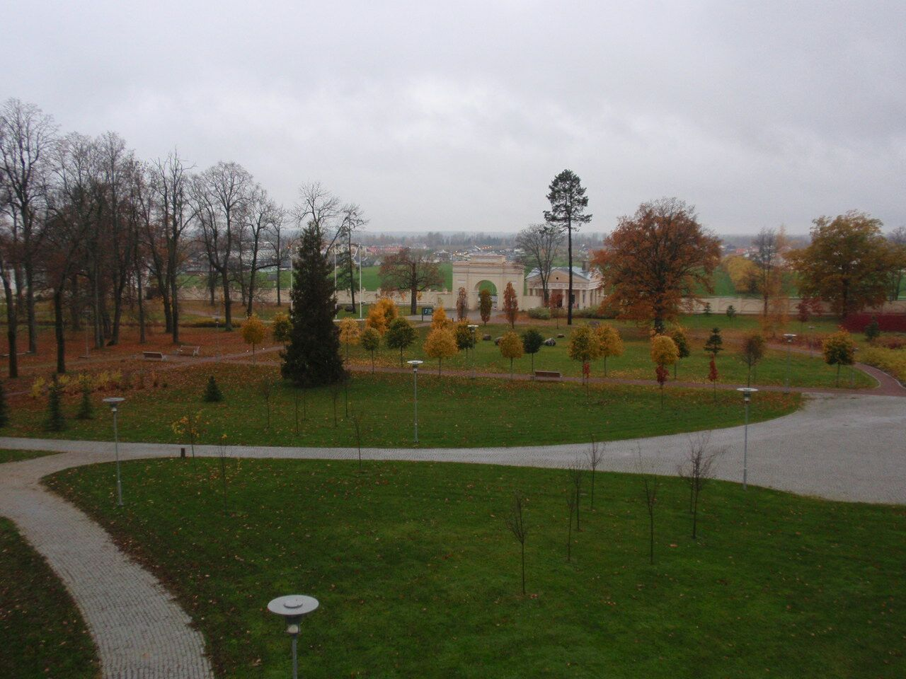 Raadi mõisa park.